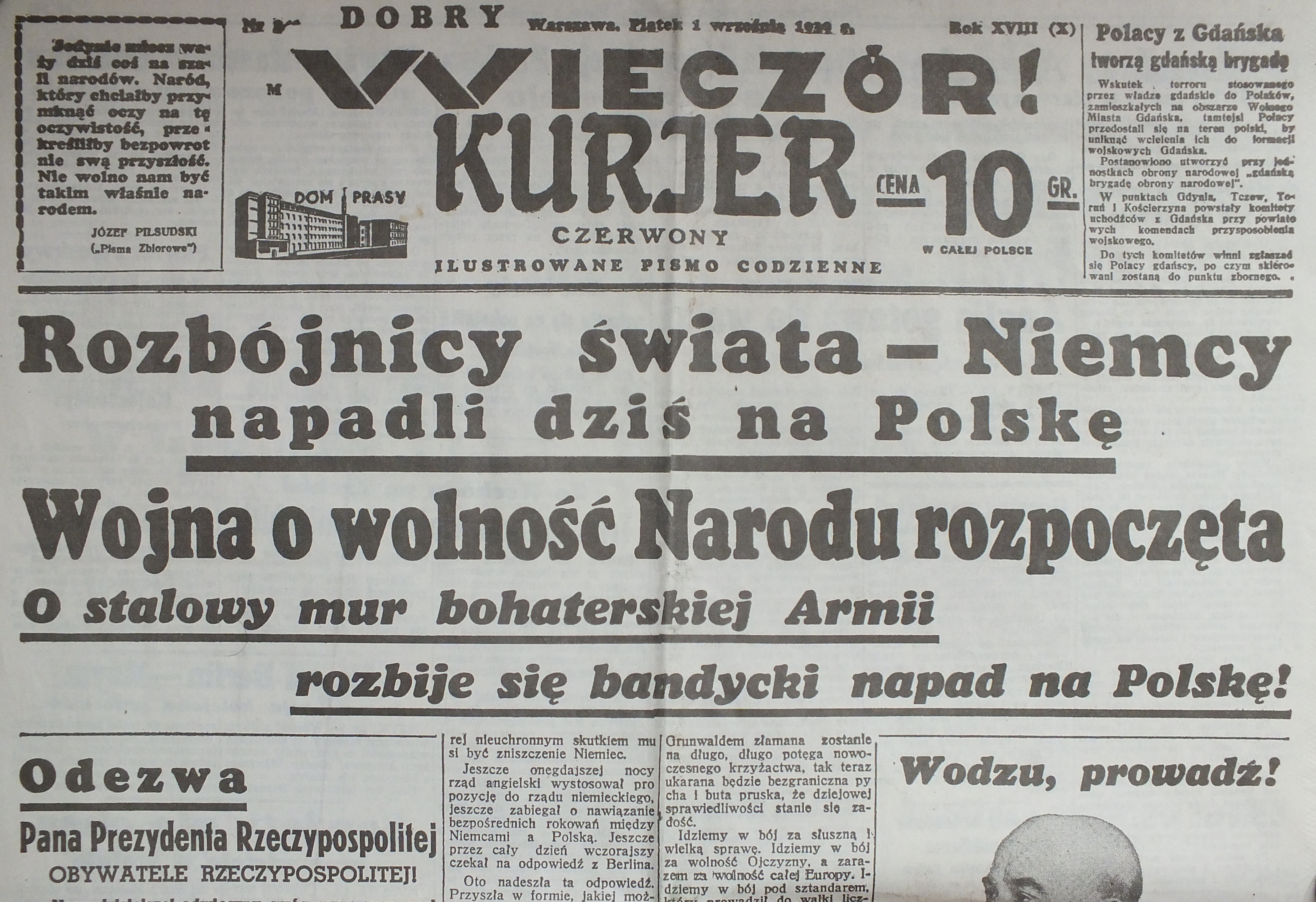 Kurjer Czerwony, 1.09.1939 r., piątek